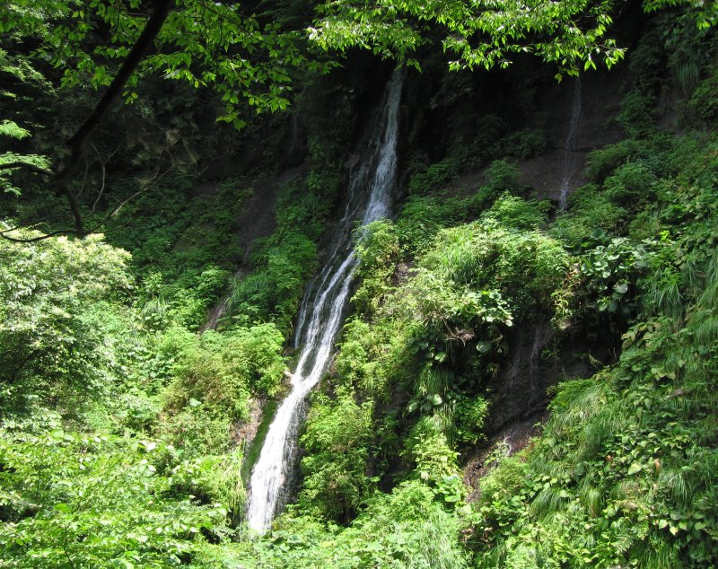 Nunobiki-Falls